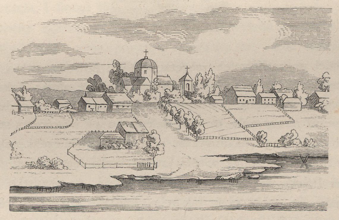 Беларуская (тарашкевіца): Вялейка (Vialejka), рака Вяльля (Vialla)